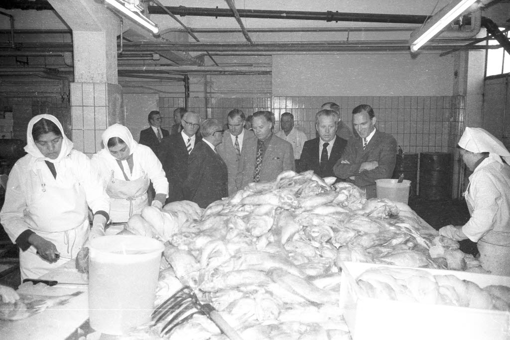 Die Mitglieder des Ausschusses informieren sich über die Probleme der Fischerei. In der Bildmitte steht Fritz Latendorf (MdL, CDU, 8.v.l.), Vorsitzender des Agrarausschusses. 2. v.r. ist Kurt Hamer (MdL SPD). Im Vordergrund verarbeiten Arbeiterinnen, offenbar Gastarbeiterinnen, den Fang zu Filets.